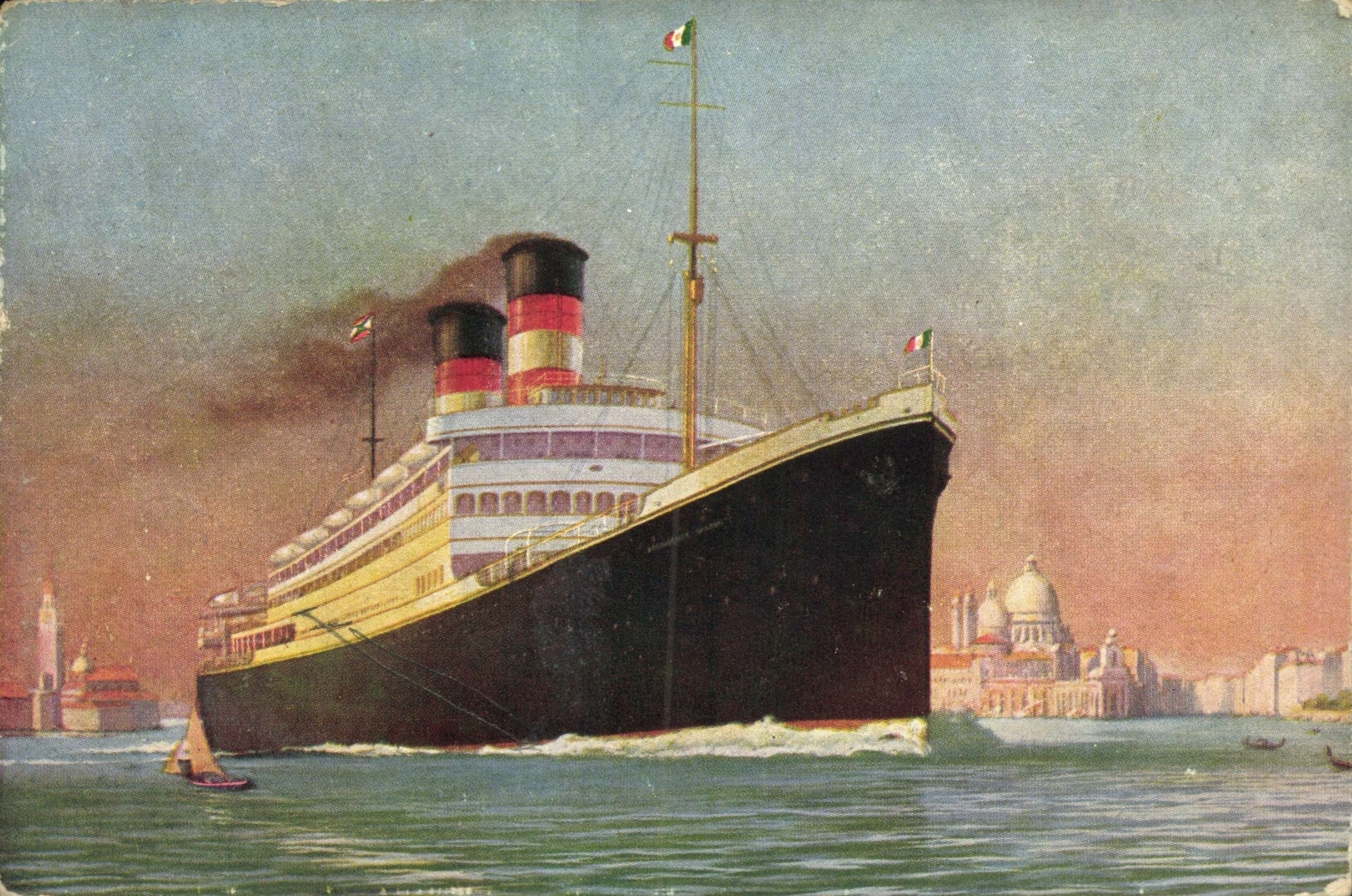 Transatlantikdampfer SS KAISER FRANZ JOSEPH I. in Venedig